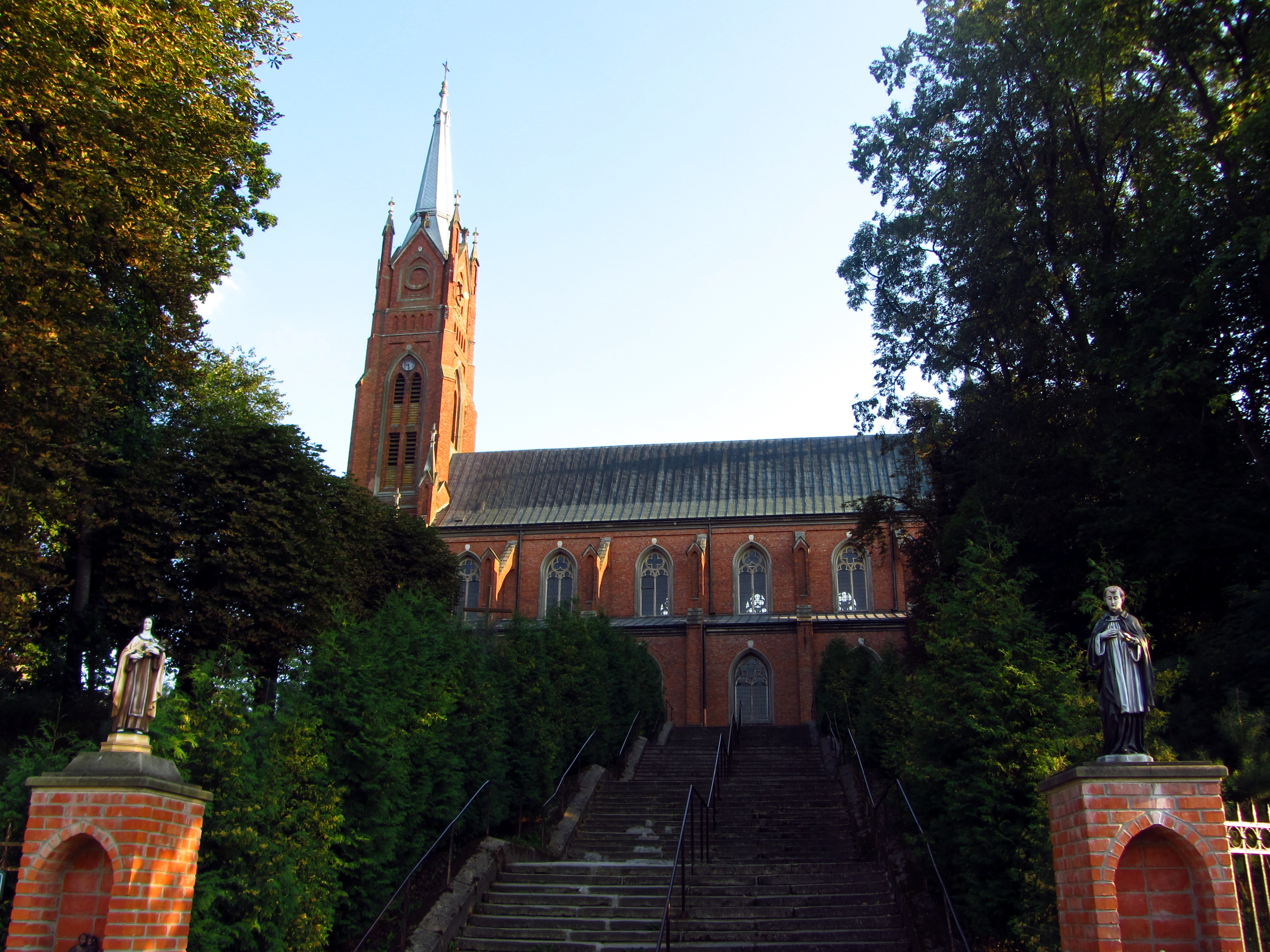 Sulejów, kościół par. pw. św. Floriana, 1901-1903